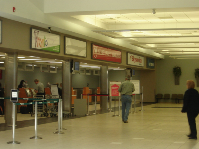 Saskatoon John G. Diefenbaker International Airport